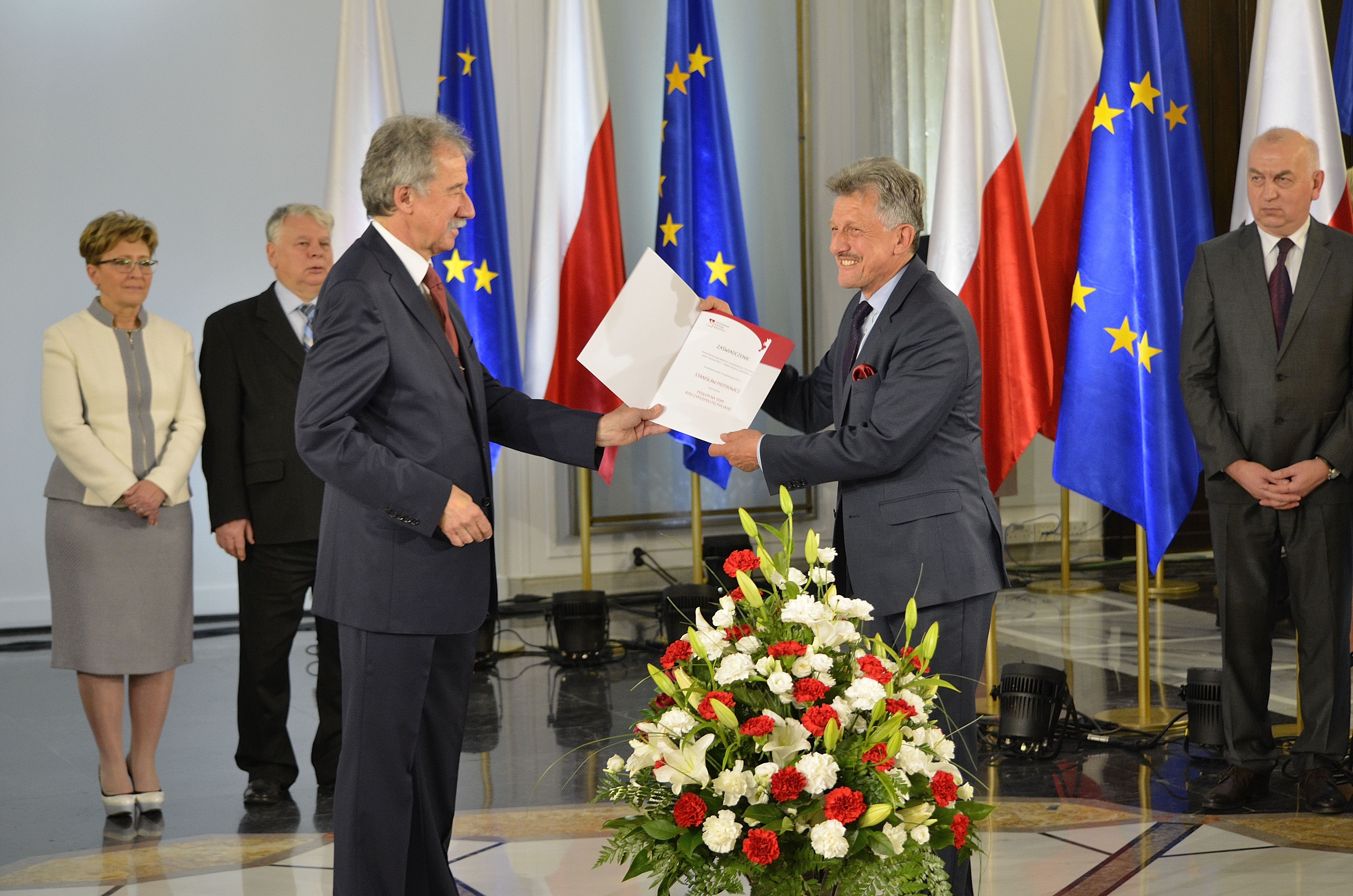 Poseł Stanisław Piotrowicz podczas uroczystości wręczenia zaświadczeń o wyborze nowo wybranym posłom w Sali Kolumnowej Sejmu